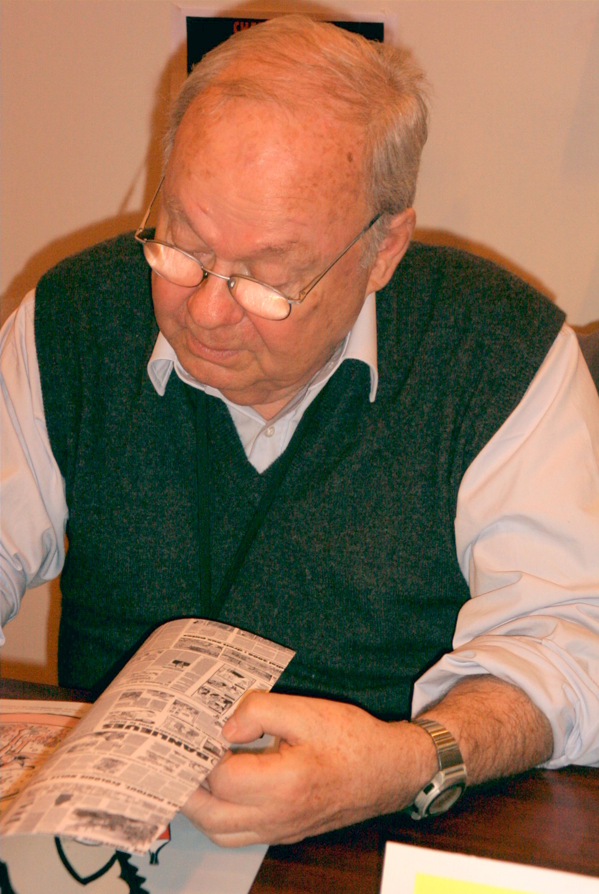 Siné by Jean-Marie david